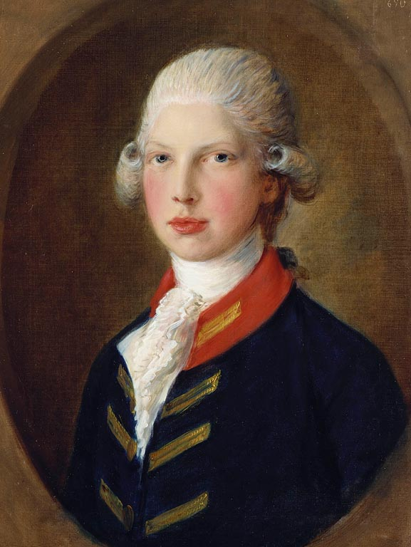 Portrait du prince Edward, fils de George III, à l'âge de 15 ans